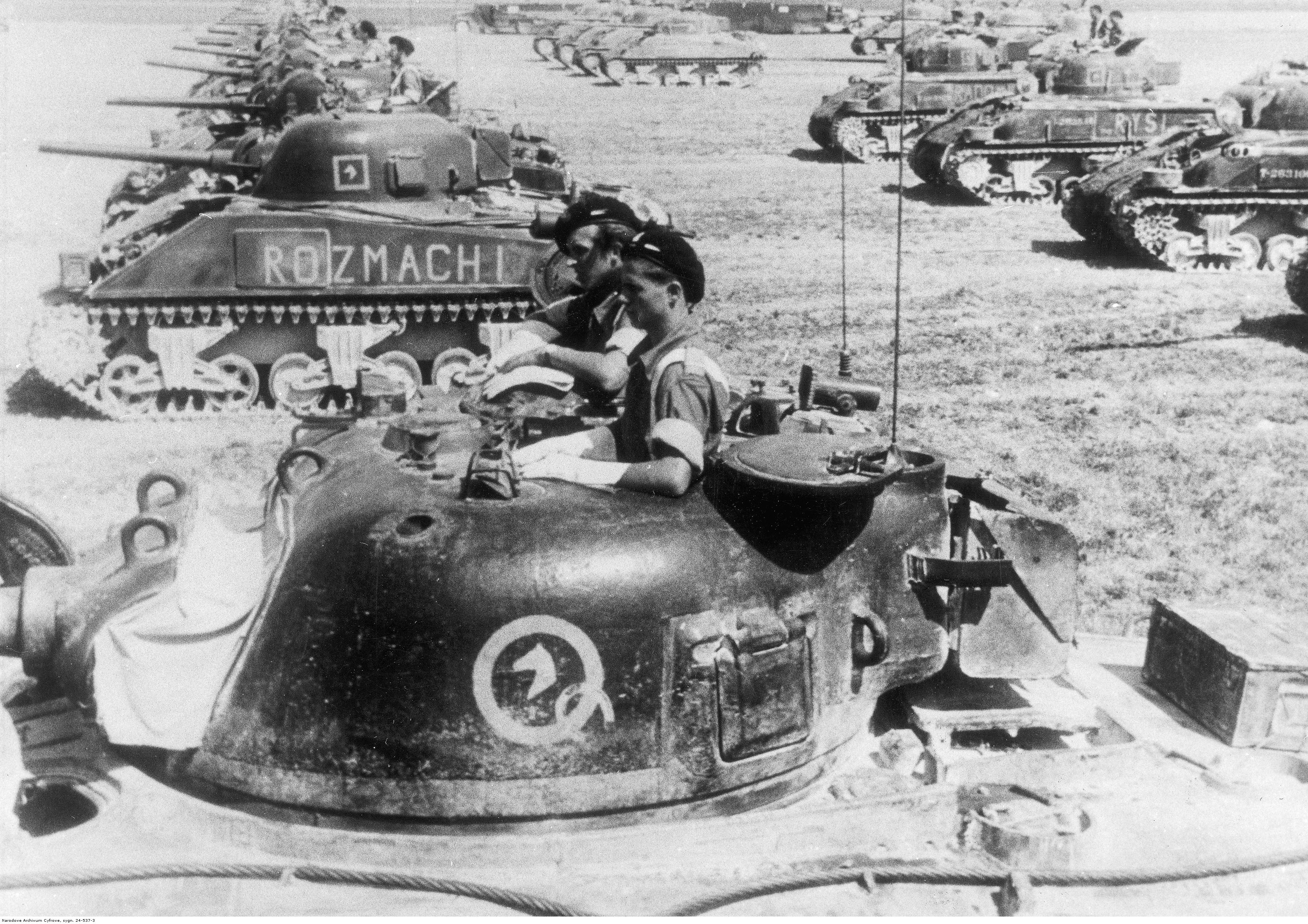 2 Warszawska Dywizja Pancerna w defiladzie pod Loreto. Czołgi Sherman M4 z 1 Pułku Ułanów Krechowieckich. Widoczne m.in. czołgi: "Rozmach I", "Ryś I", "Radom II". Archiwum Fotograficzne Tadeusza Szumańskiego. Sygnatura: 24-537-3